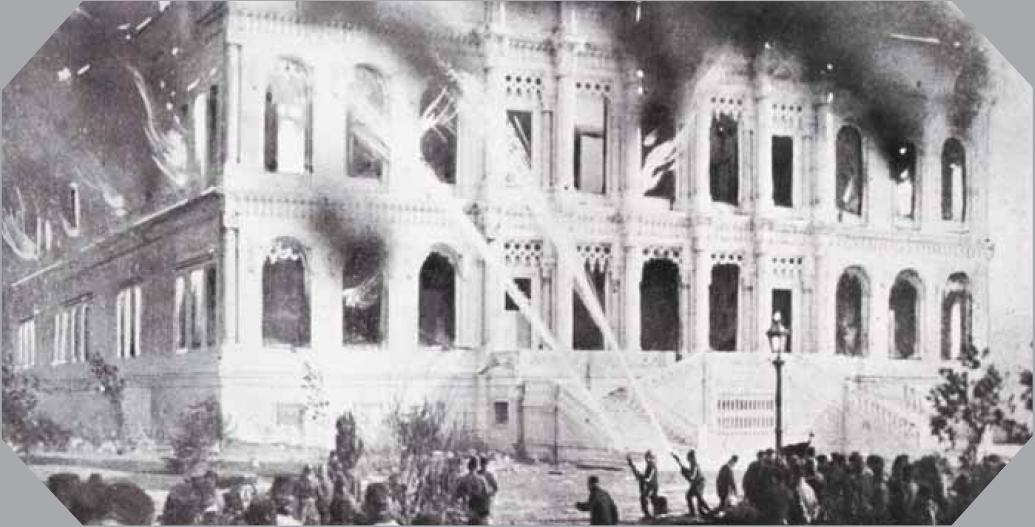 Çırağan Palace